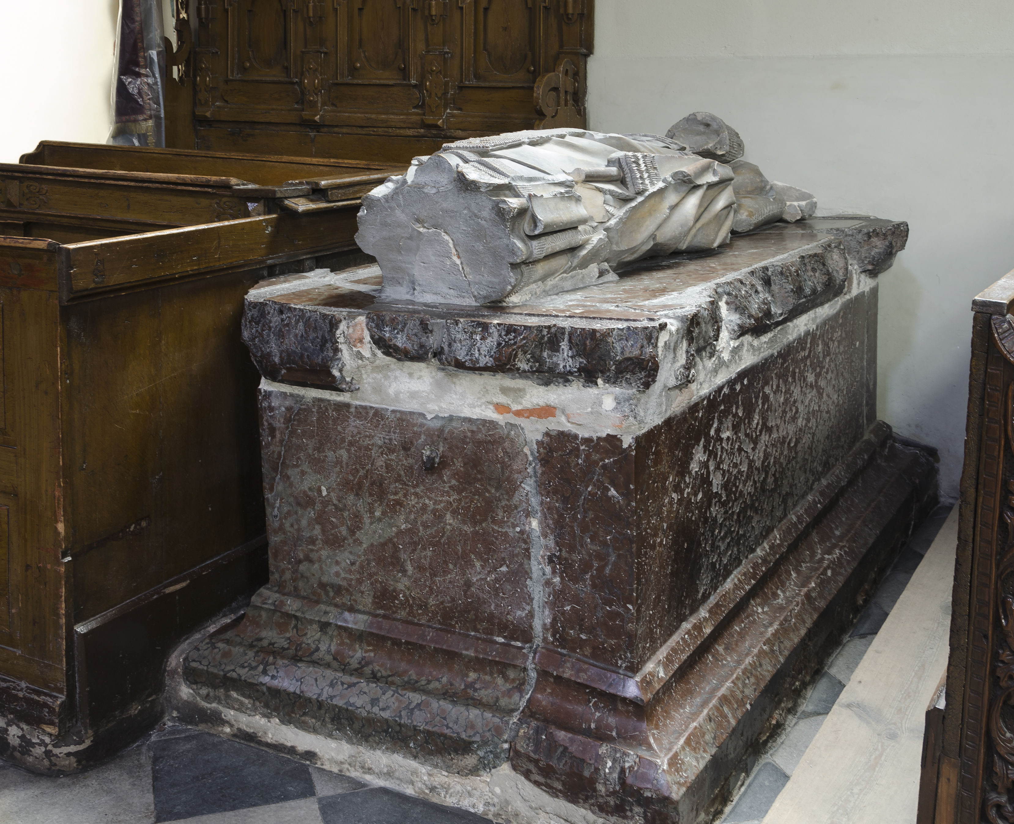 Kłodzko, kościół Joannitów, nast. Jezuitów, ob. parafialny pw. Wniebowzięcia NMP, poł. XIV, XVI, 2 poł. XVII, XIX w.